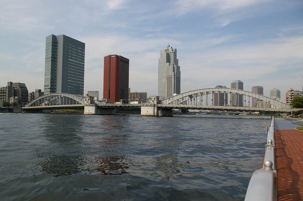 勝鬨橋-2005年5月21日投稿者撮影